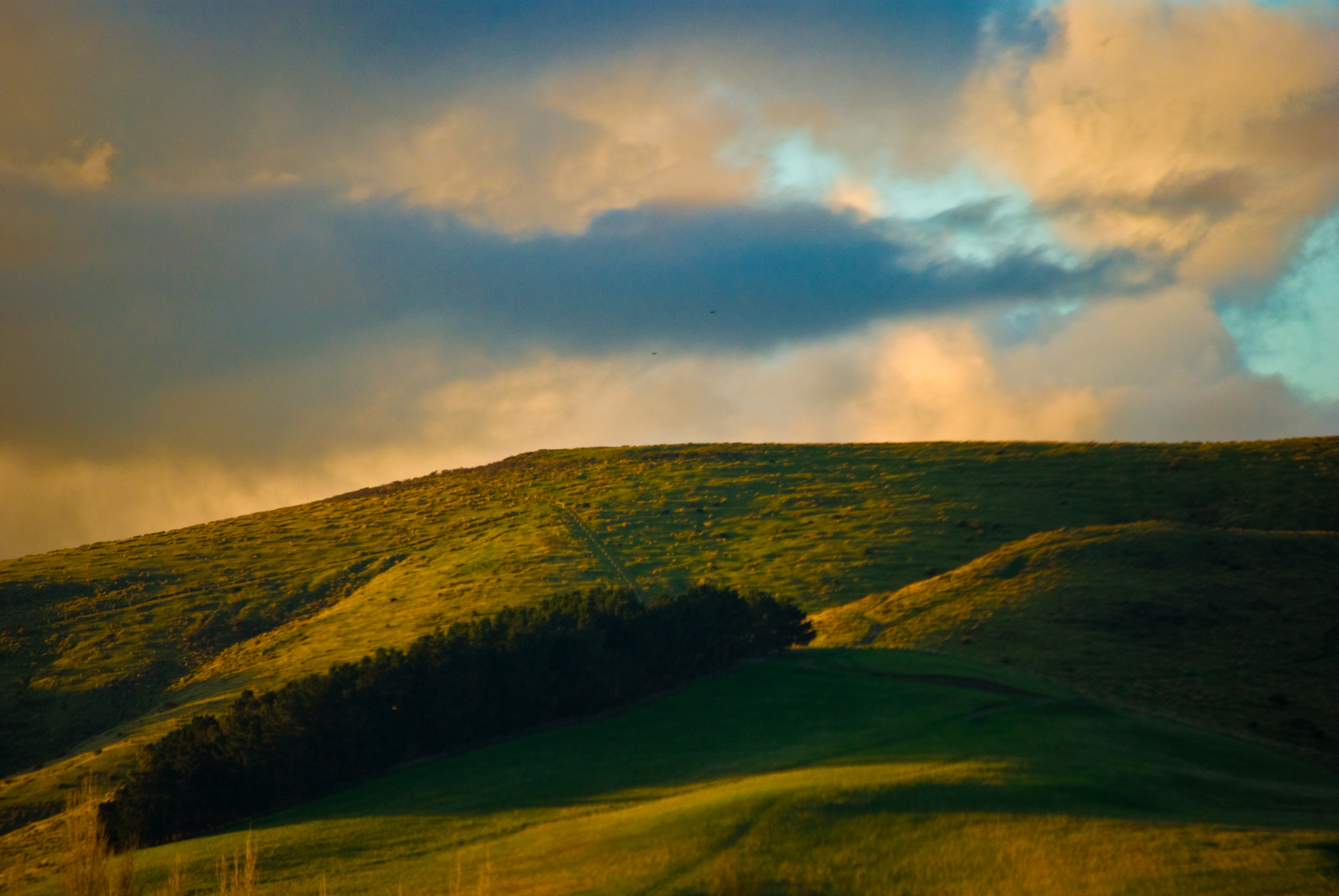 Motukarara, Canterbury, New Zealand, 5 May 2008